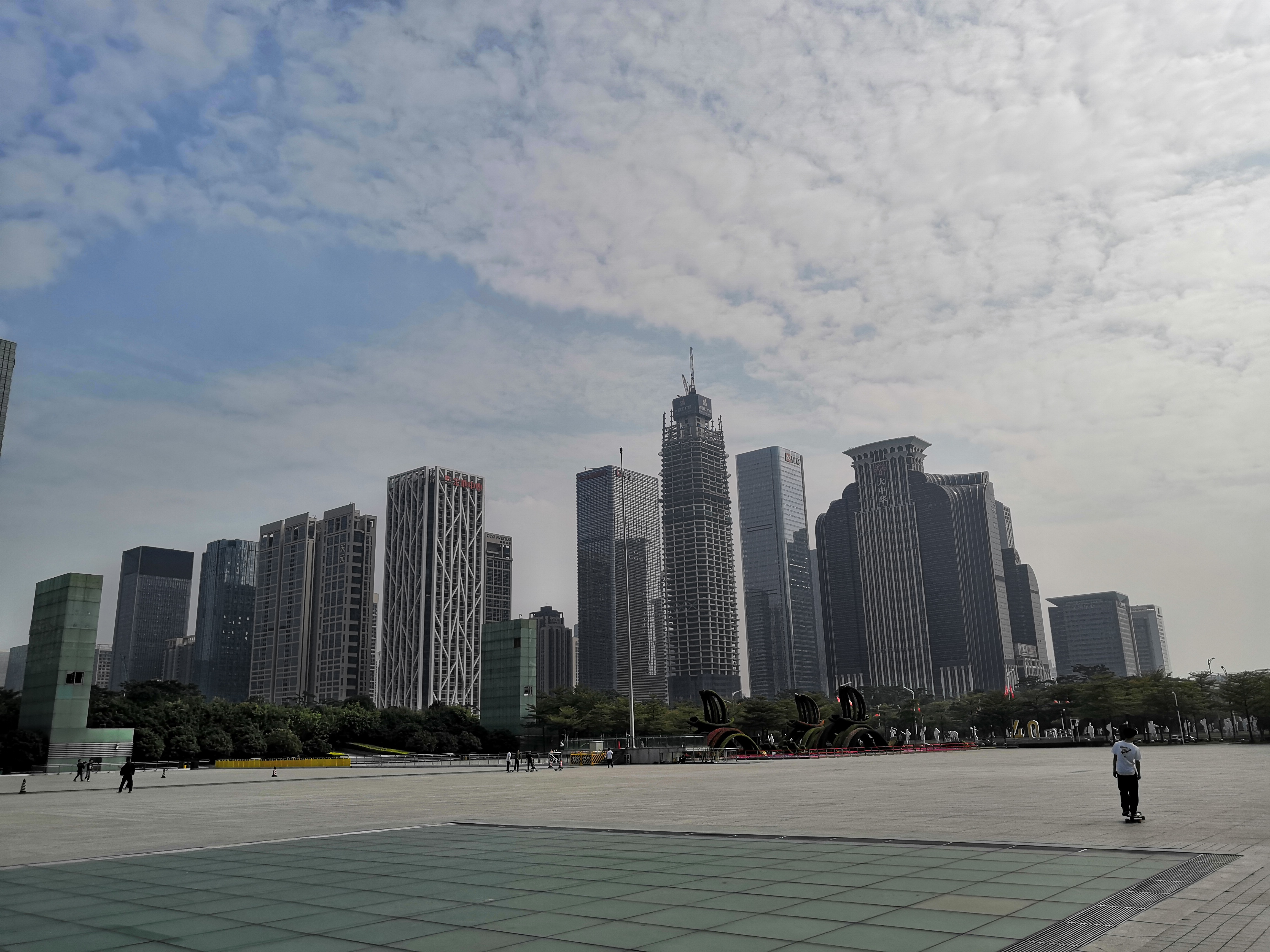 中文（中国大陆）: shenzhen 20181222 134536